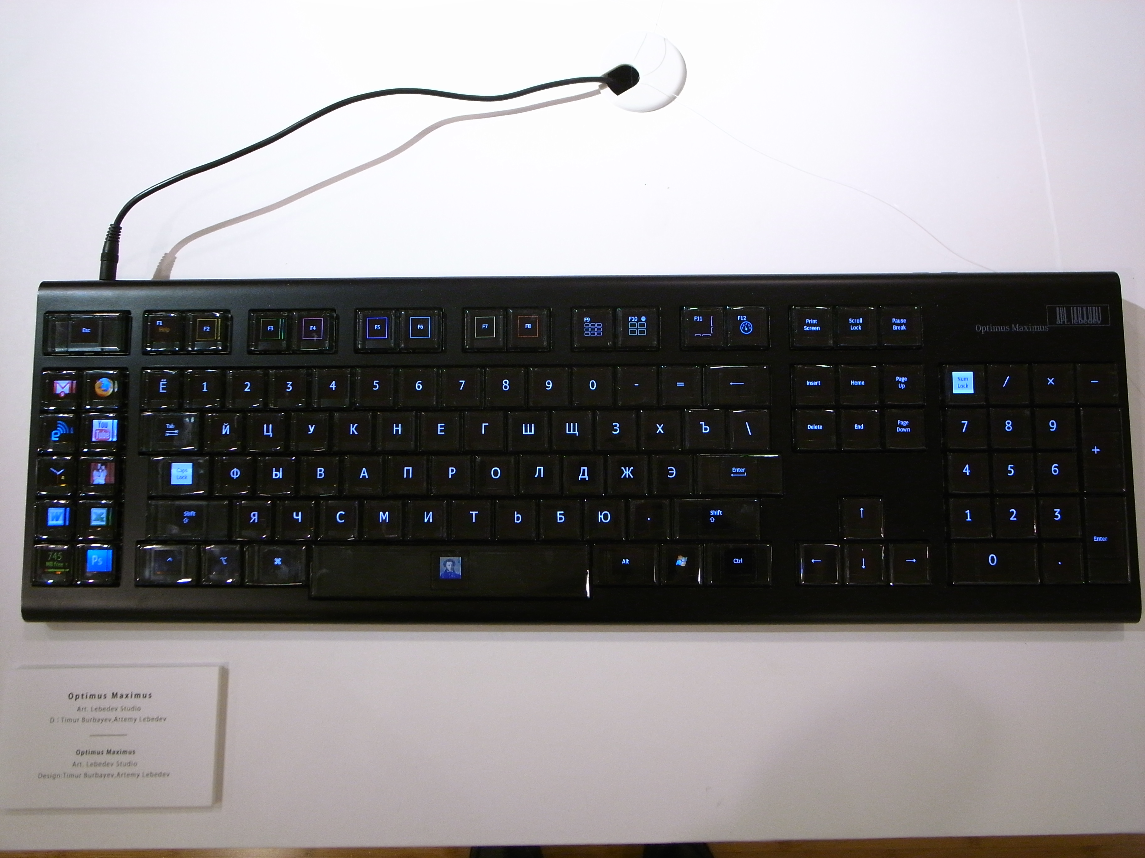 Optimus Maximus keyboard